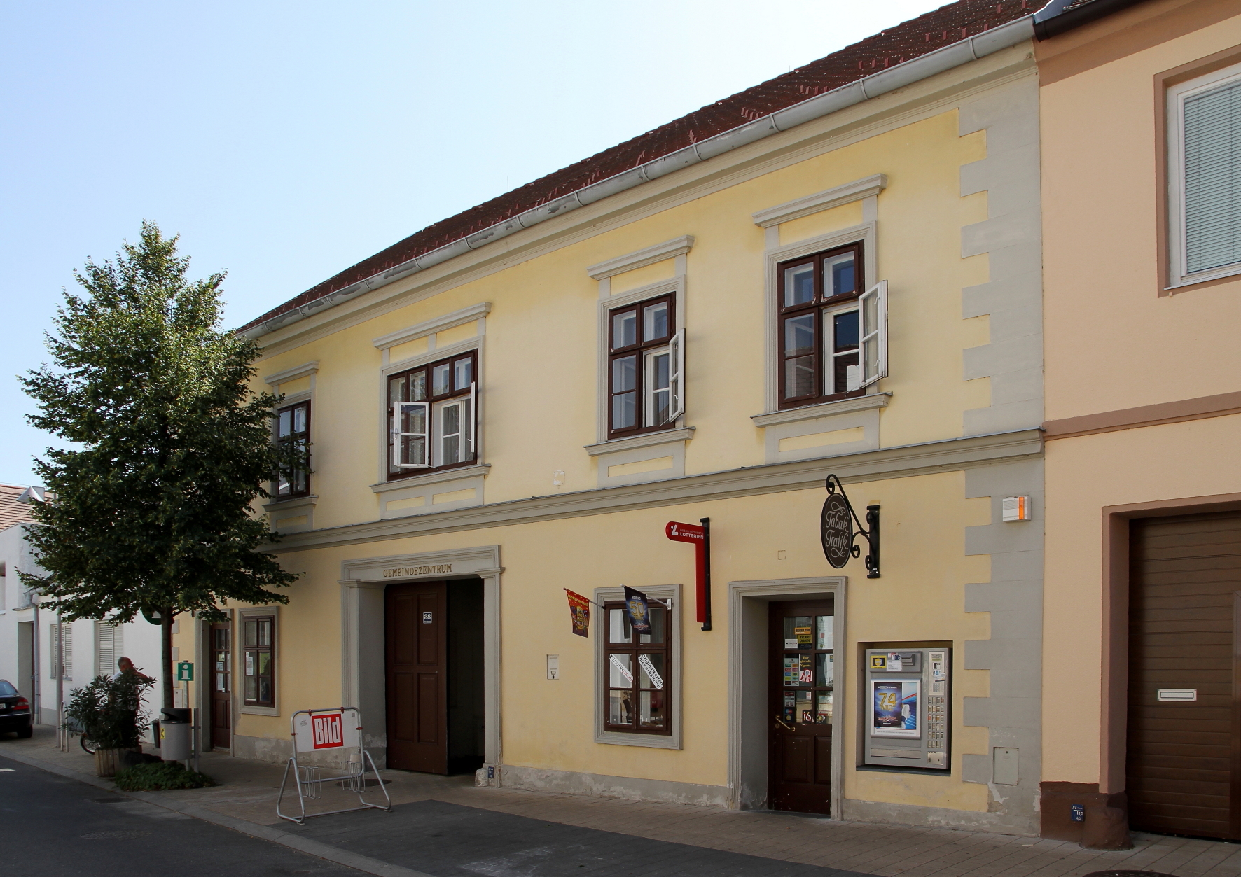 Das denkmalgeschützte Gemeindezentrum in der burgenländischen Stadt Purbach am Neusiedler See.